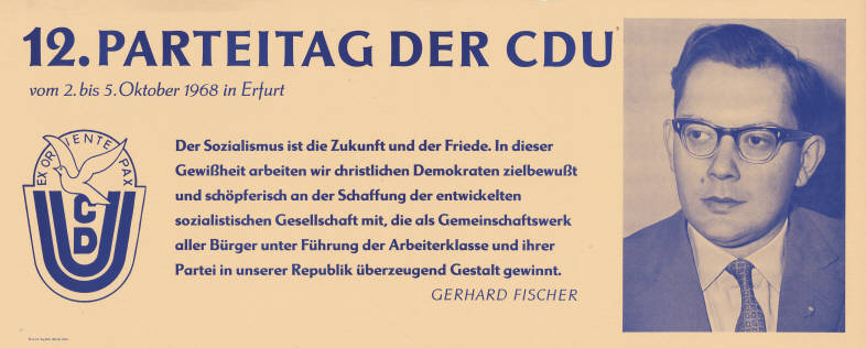 12. Parteitag der CDU ... Der Sozialismus ist die Zukunft und der Friede ... Gerhard Fischer Abbildung: Parteilogo - Porträtfoto Gerhard Fischer Plakatart: Kandidaten-/Personenplakat mit Porträt Drucker_Druckart_Druckort: III-9-19 Ag 224-100-8 7265 Objekt-Signatur: 10-024 : 3084 Bestand: Plakate aus der SBZ/DDR (10-024) GliederungBestand10-18: Ost-CDU / CDUD / Exil-CDU Lizenz: KAS/ACDP 10-024 : 3084 CC-BY-SA 3.0 DE